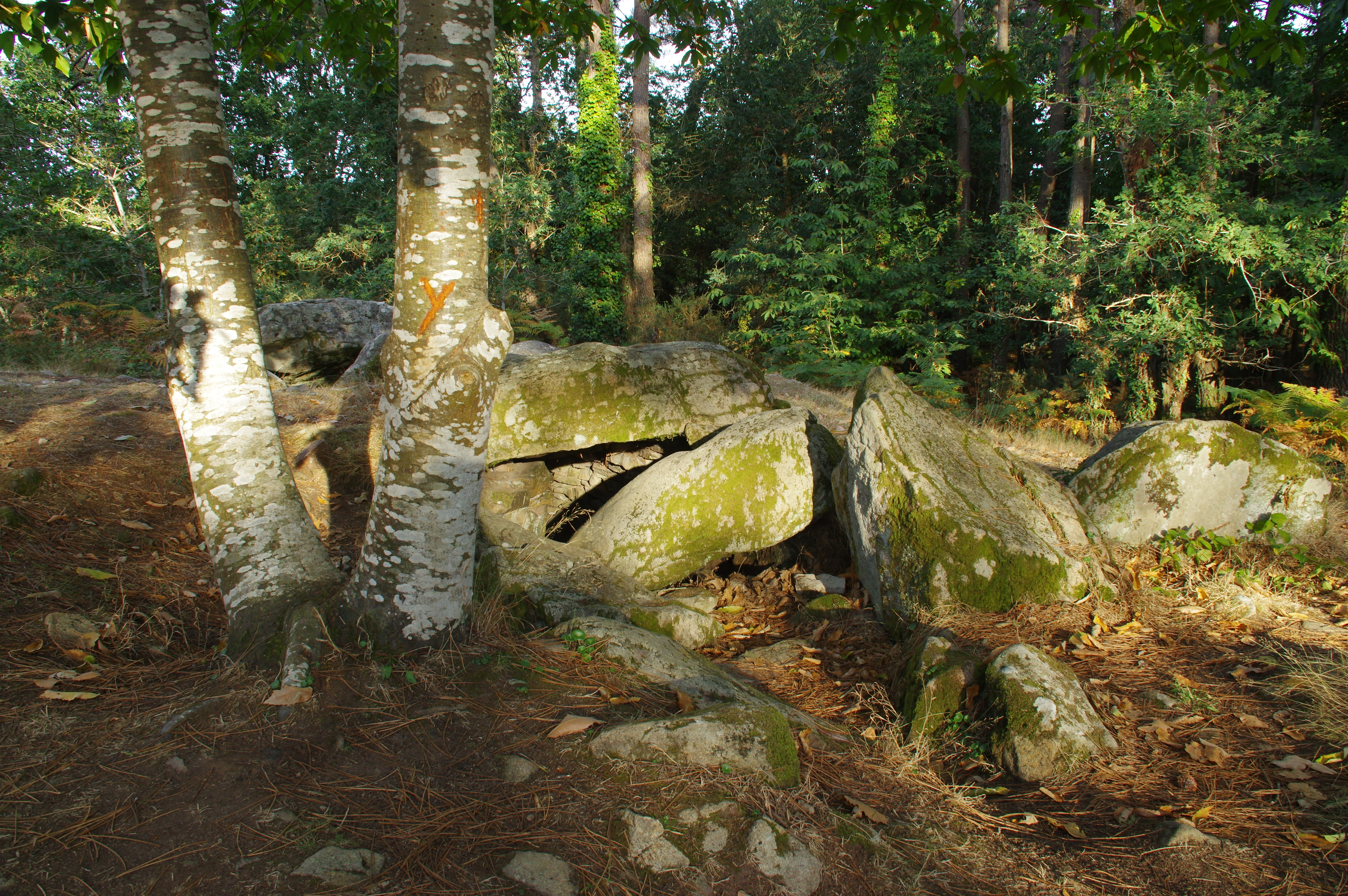 Le dolmen de Toulvern à Baden (Morbihan).